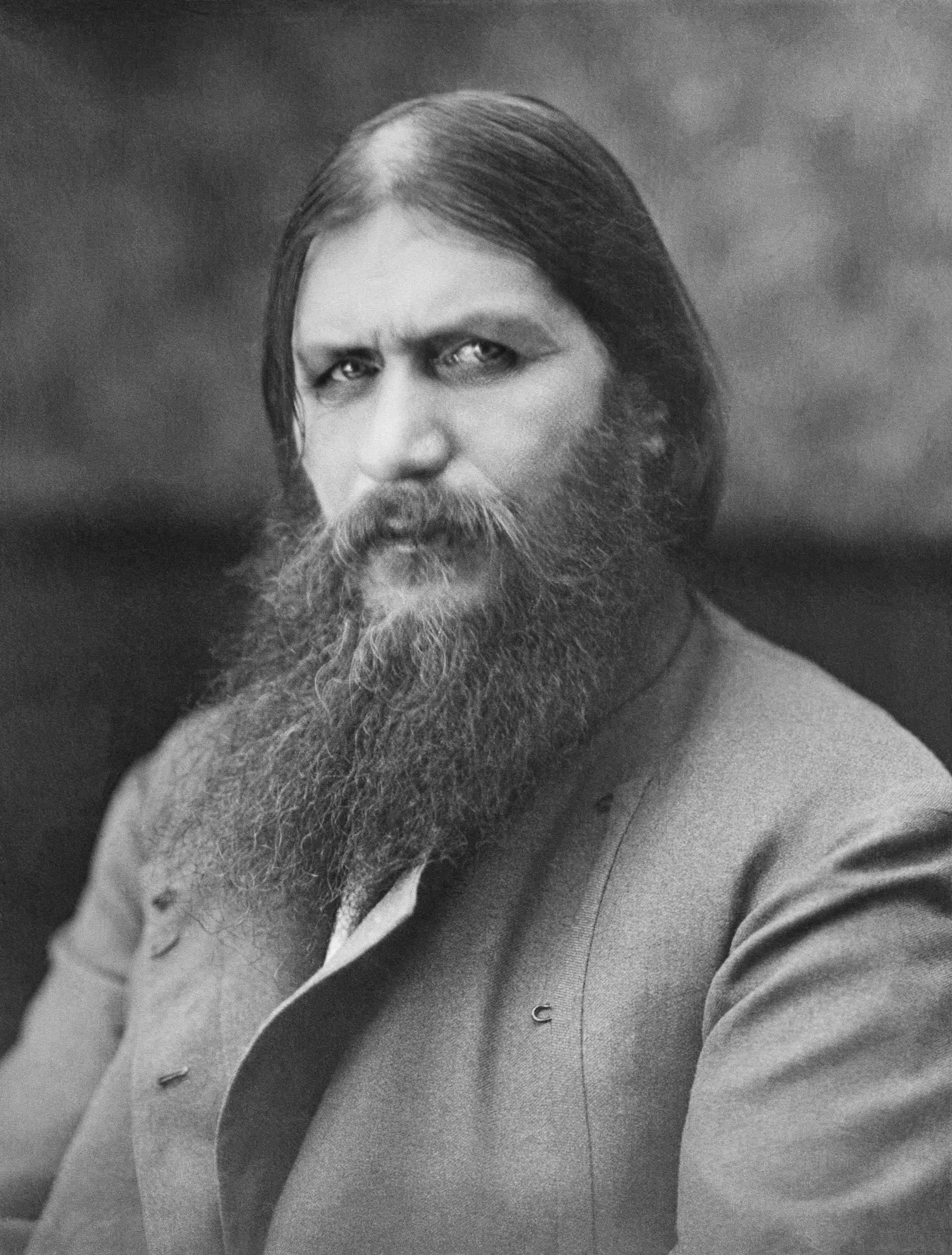 Grigori Rasputin (1864-1916)